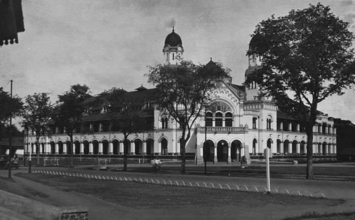 Kantor pusat Nederlands-Indische Spoorweg Maatschappij (NIS)dan Serajoedal Stoomtram Maatschappij (SDS) di Semarang